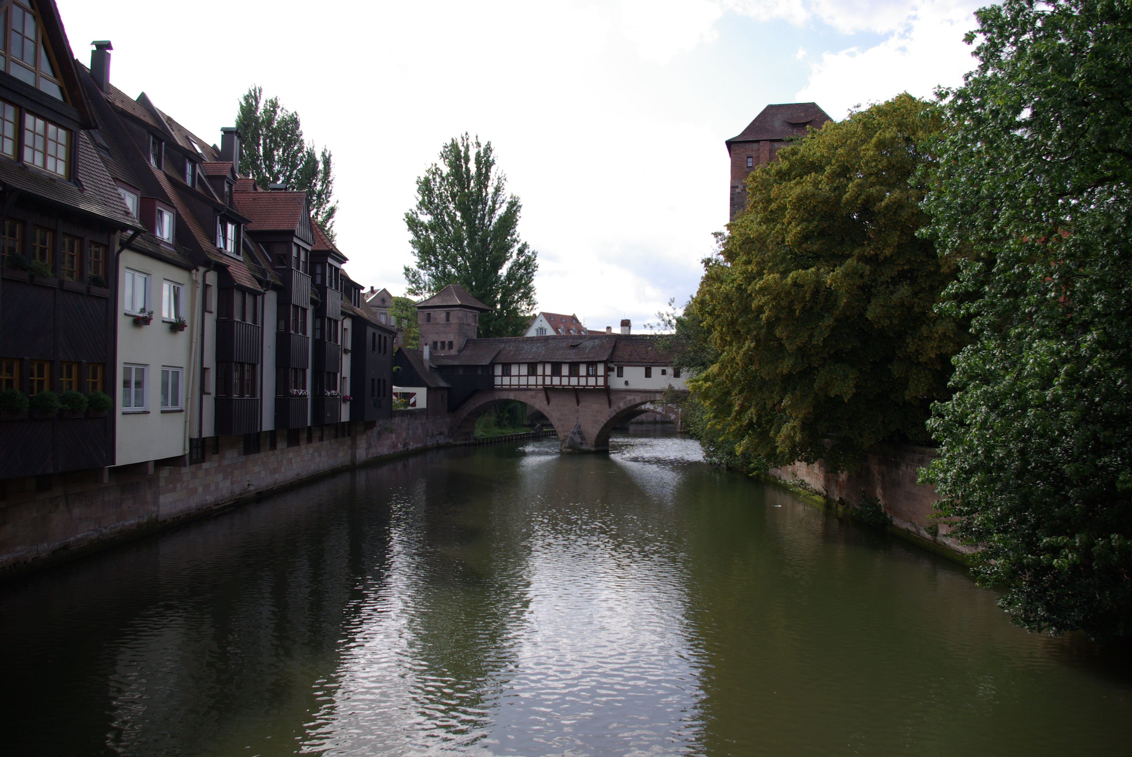 Der nördliche Henkersteg und der Henkerturm in Nürnberg, Blick von der nördlichen Karlsbrücke nach Westen